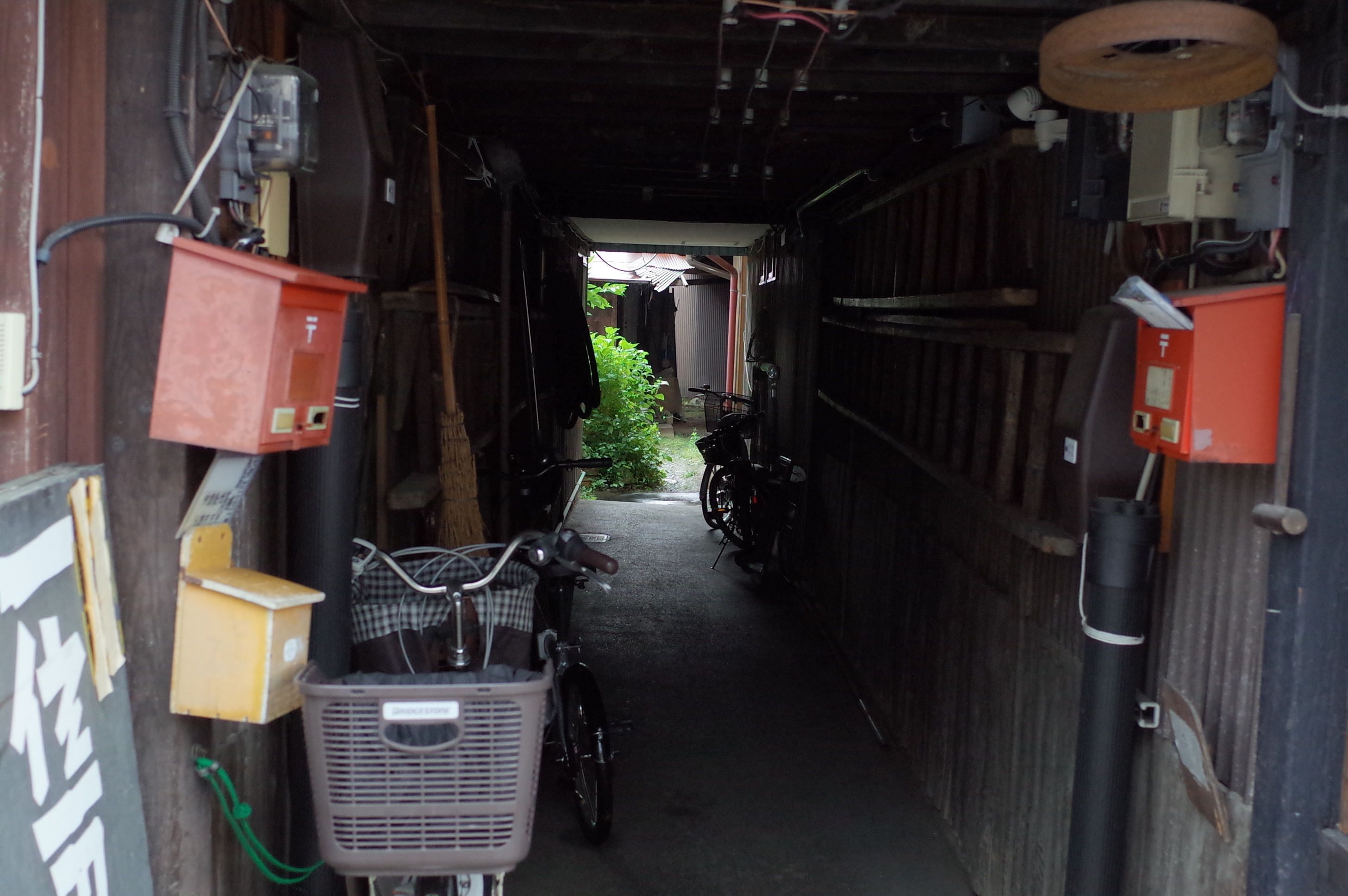 裏庭ヘツヅク道